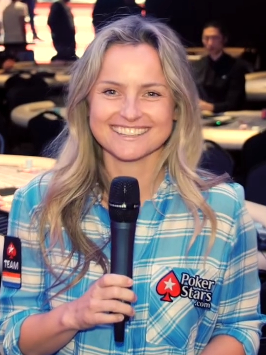 Fatima Moreira de Melo bei der WPT Amsterdam